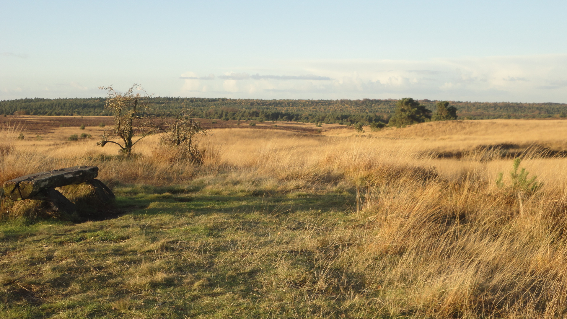 bankje in de veluwe This is a photo or sound file made in Veluwezoom National Park in the Netherlands, with the main subject of the file in the category: landscapes